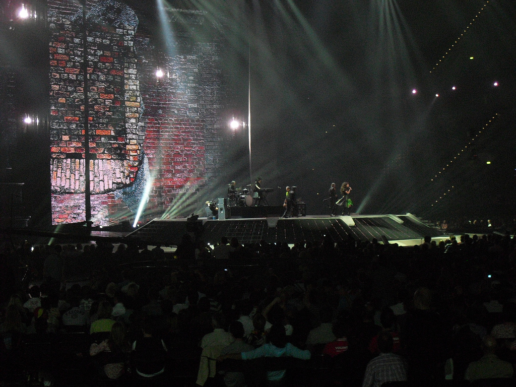 Georgia